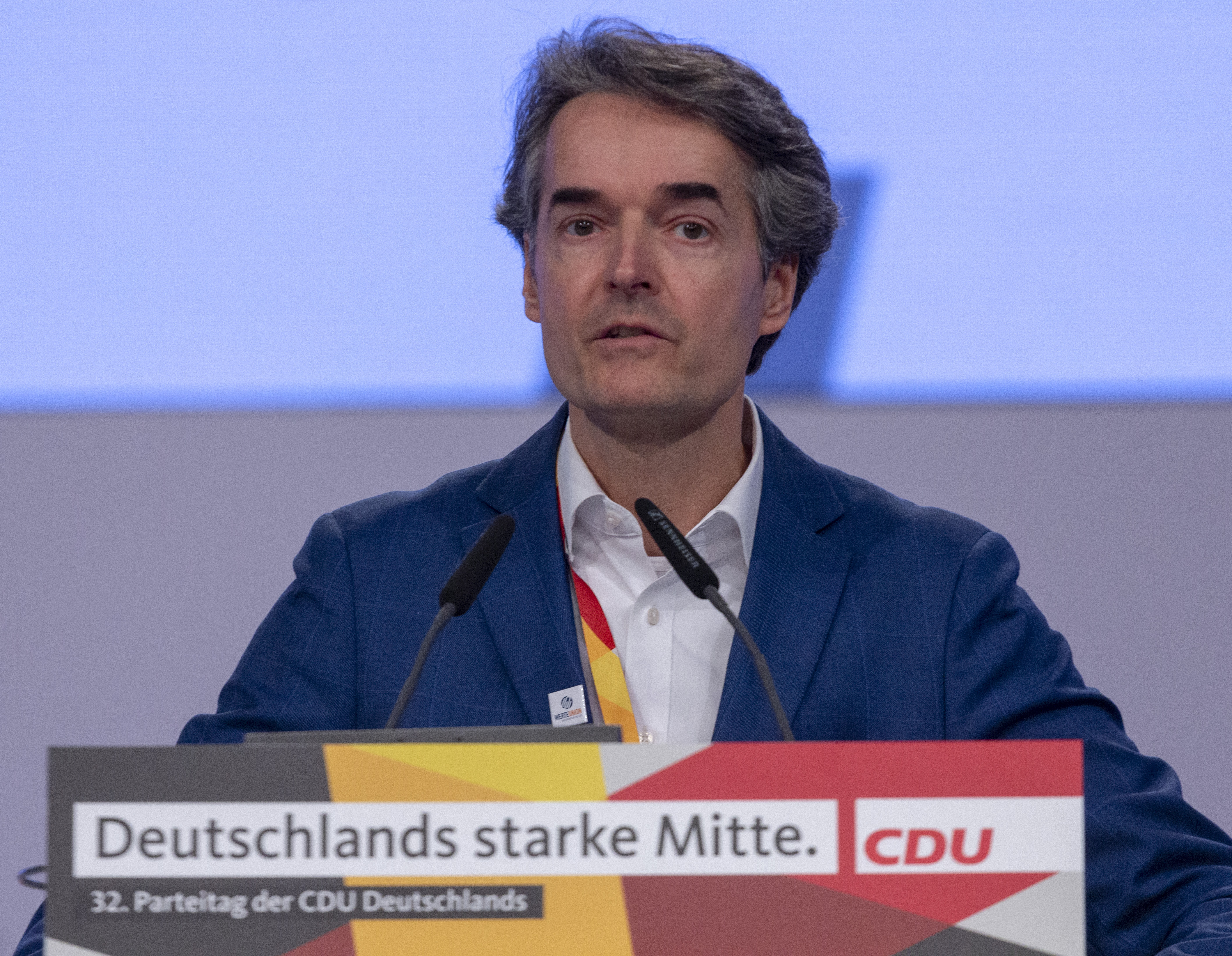 Alexander Mitsch auf dem CDU Parteitag 2019 am 23. November 2019 in Leipzig.